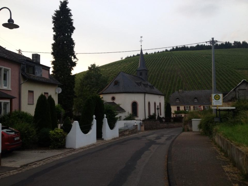 Eitelsbach Kirche in Trier-Ruwer/Eitelsbach